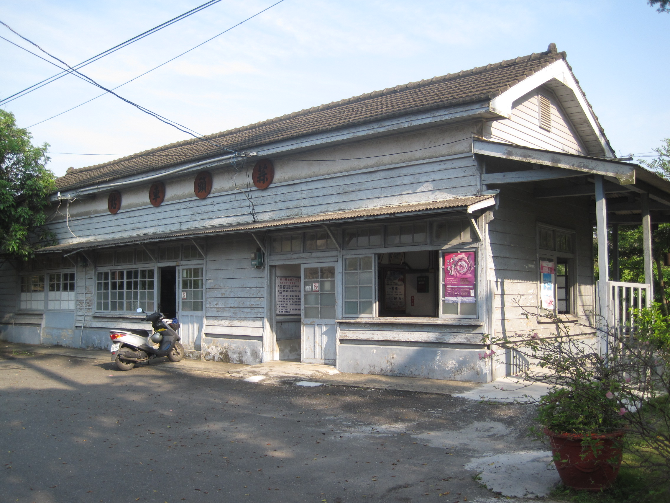 蒜頭糖廠裡的蒜頭車站